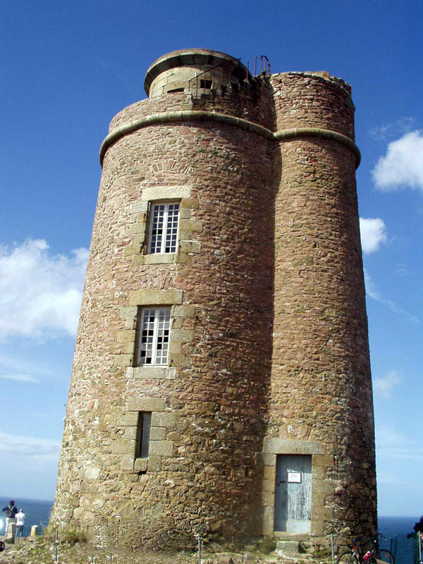 Phare du Cap Fréhel (22) - France